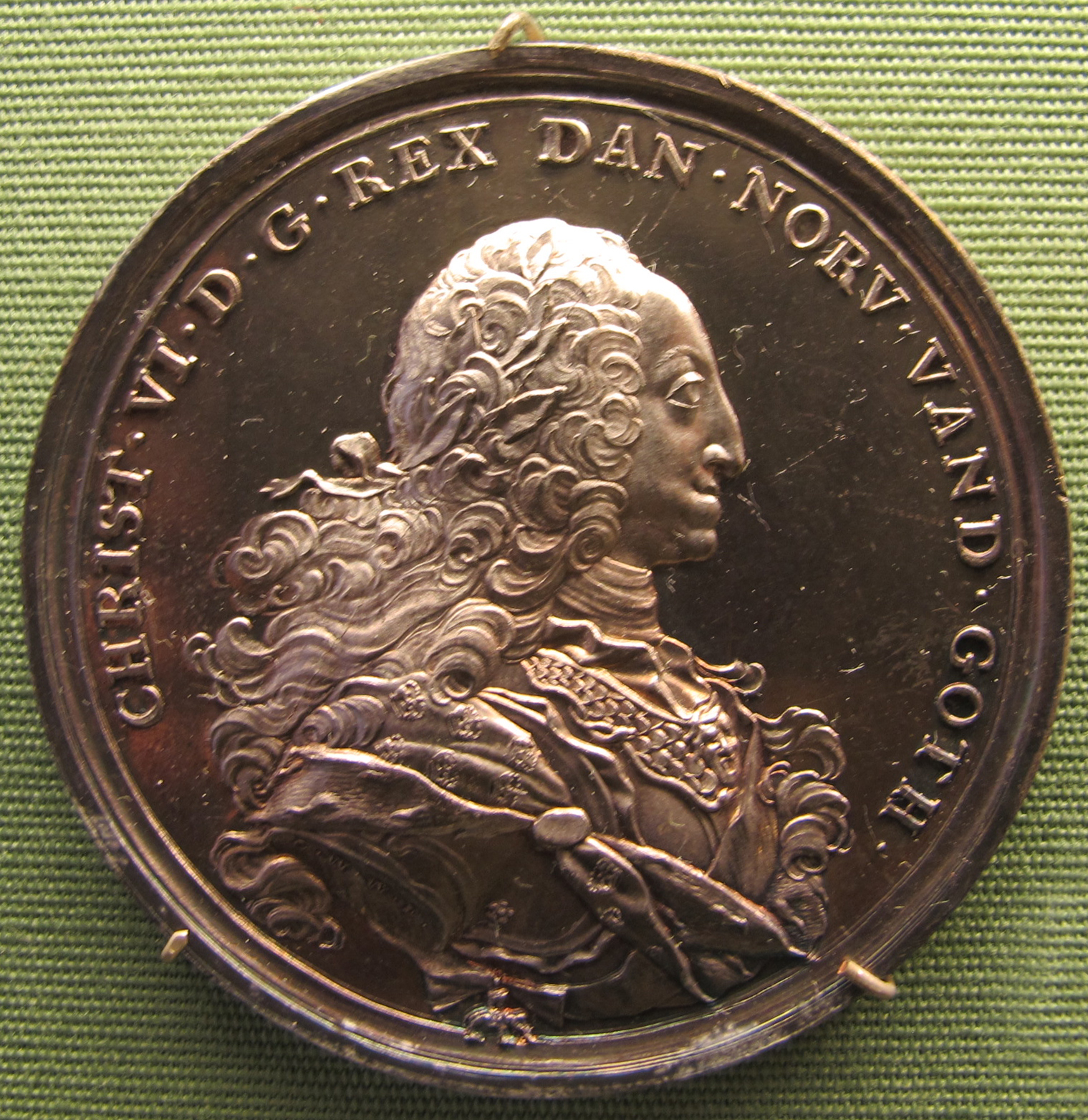 Cristiano VI di Danimarca, arg, 1736